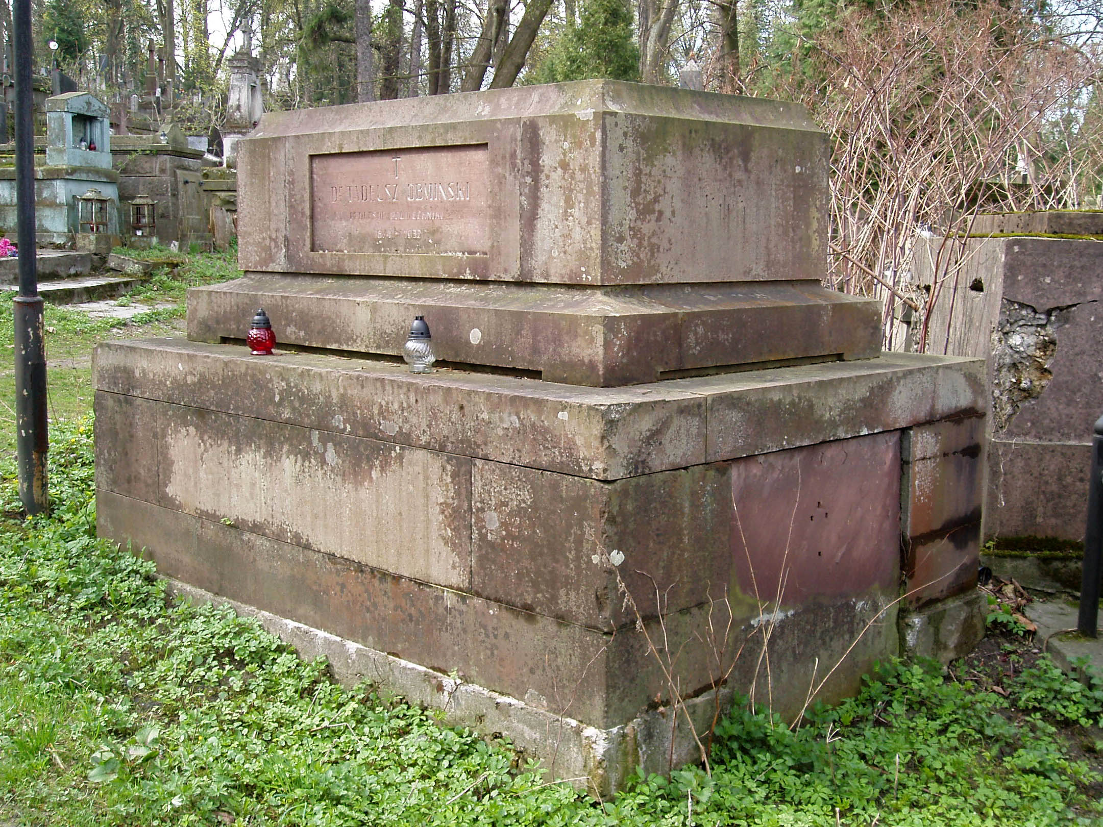 Гробівець архітектора Тадеуша Обмінського на Личаківському цвинтарі.